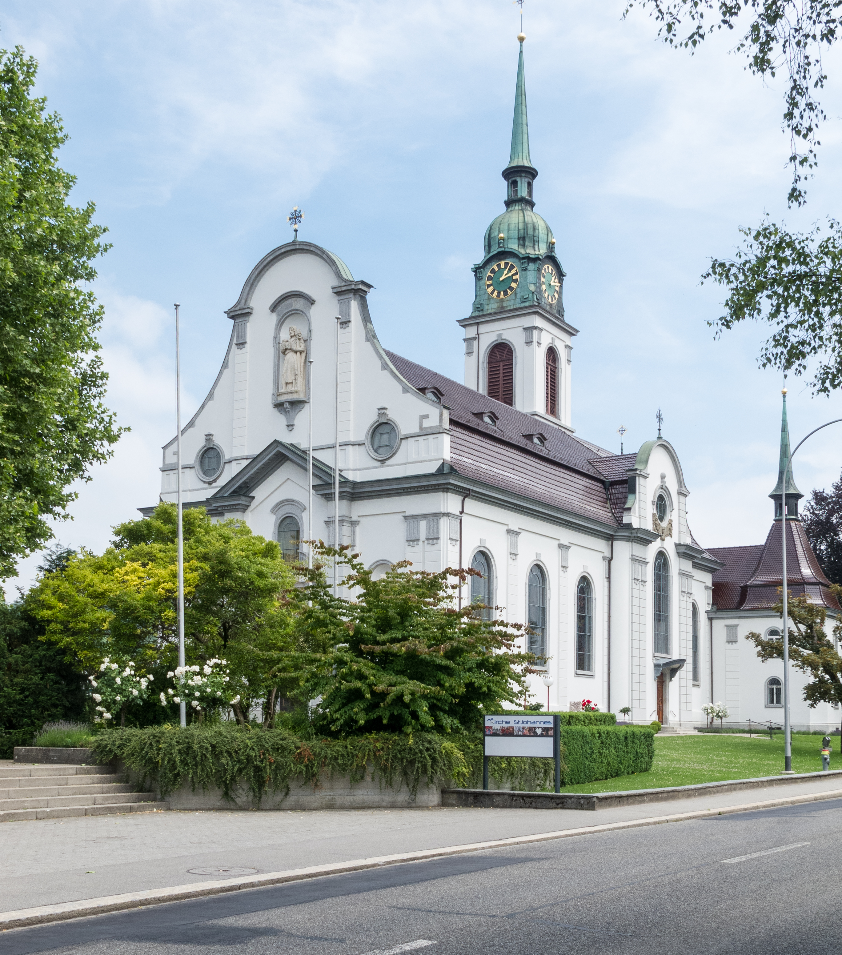 Katholischen Kirche Weinfelden